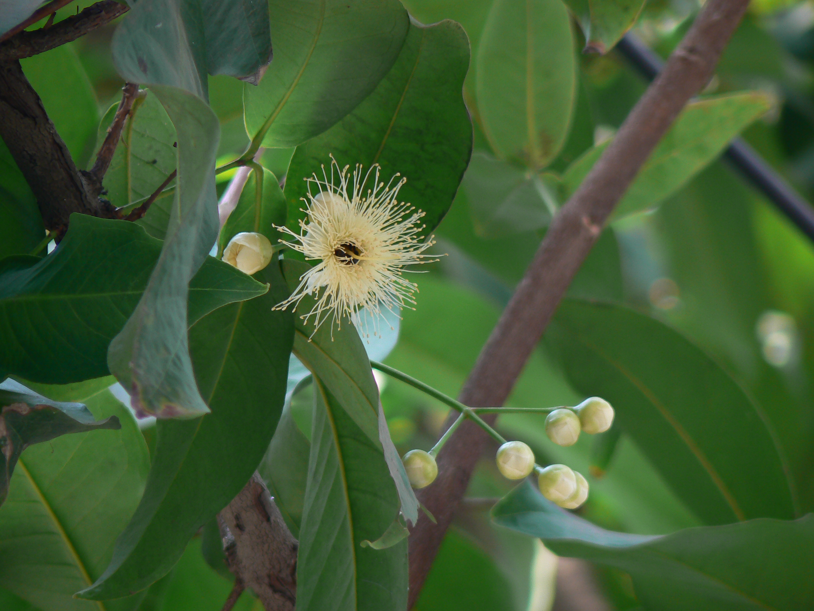 Syzygium samarangense